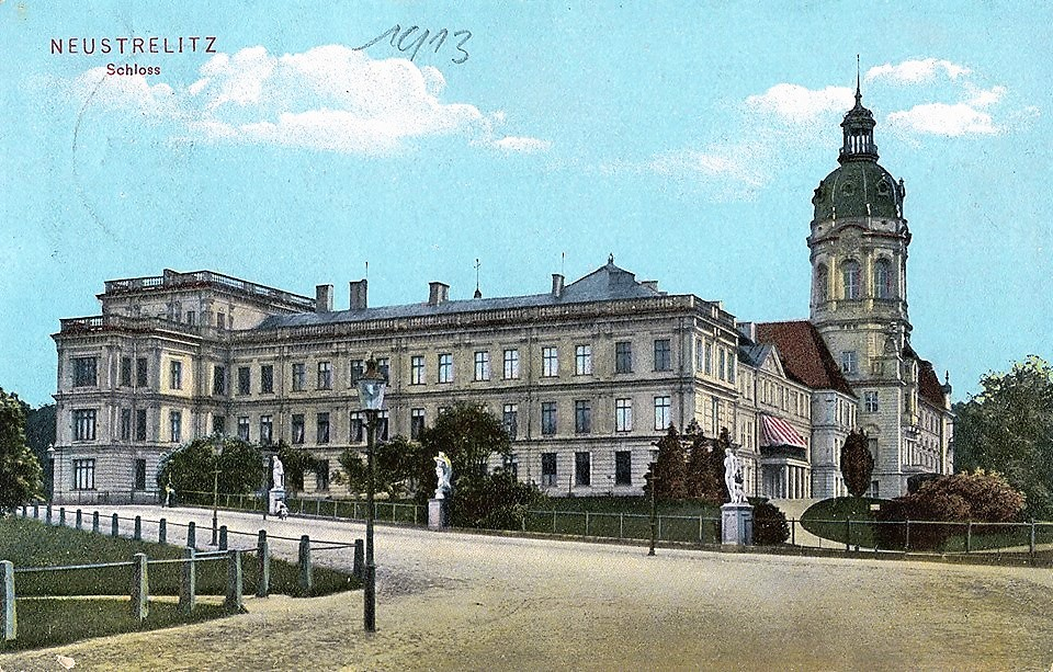 Neustrelitzer Residenzschloss Postkarte koloriert 1913